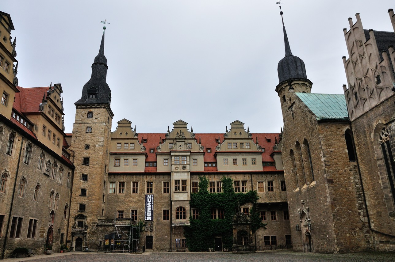 Schloss Merseburg, Ostflügel